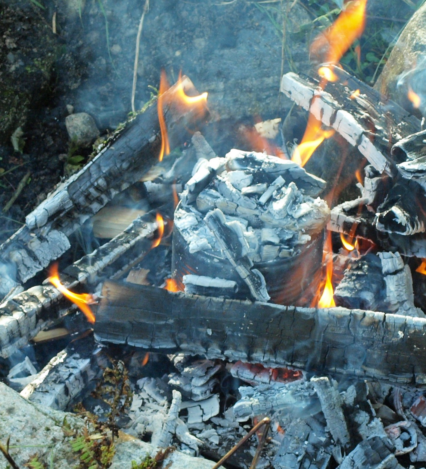 Tjørebrenning med minimile